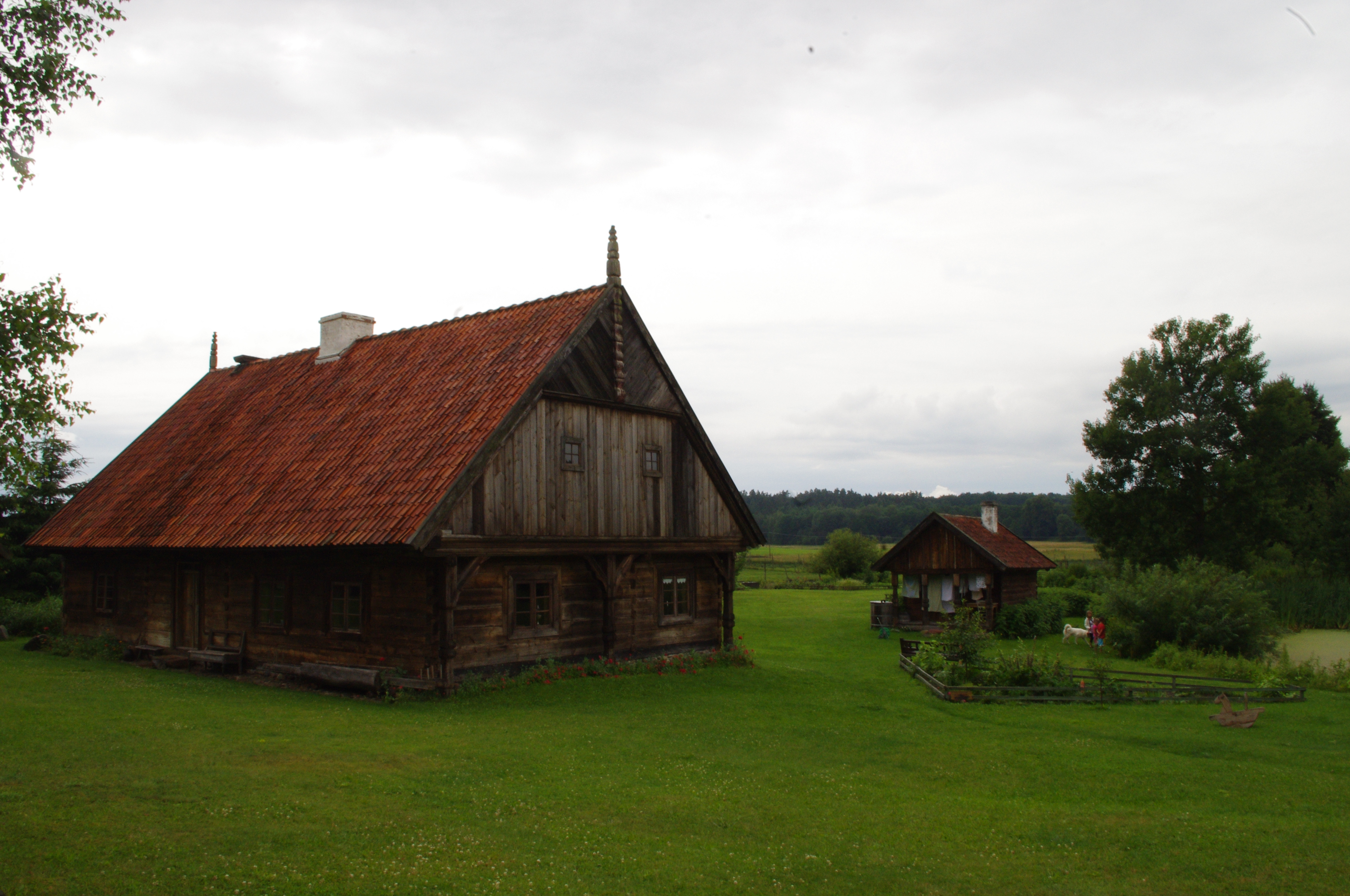 Kadzidłowo - chałupa podcieniowa z Warnowa, w zespole Oberży pod Psem, poł. XIX